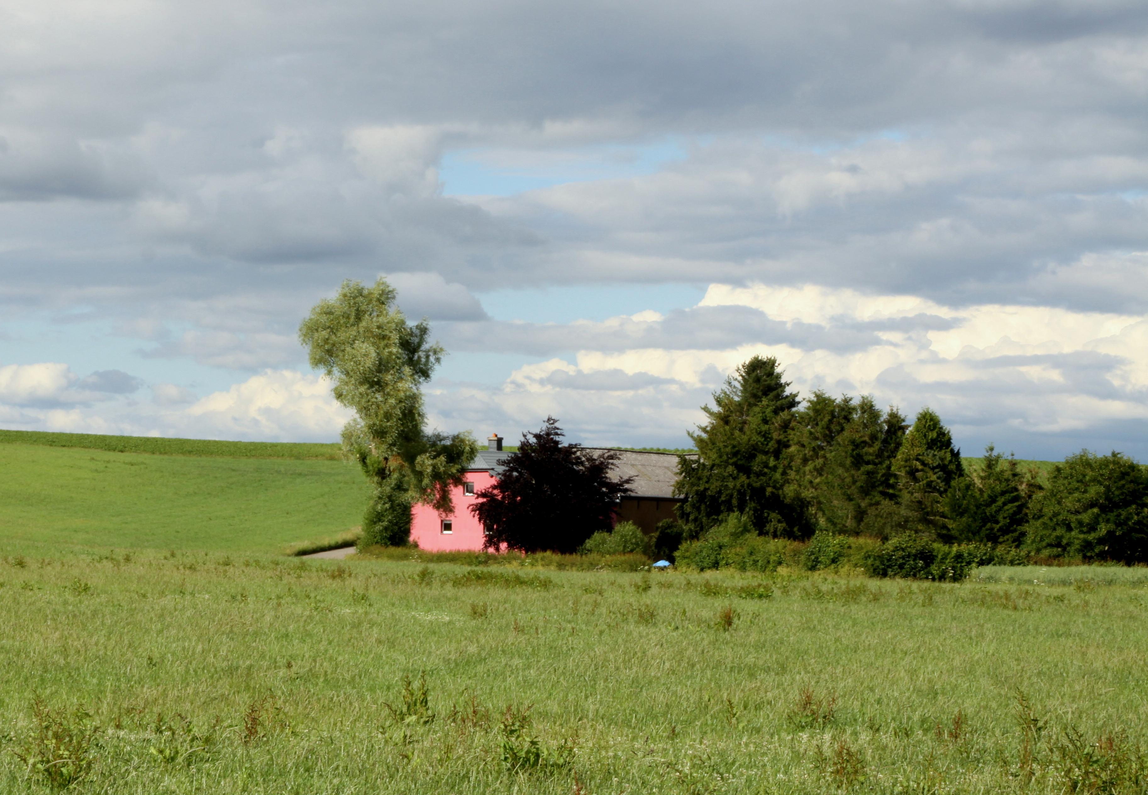 De Fossenhaff vu Süde gesinn